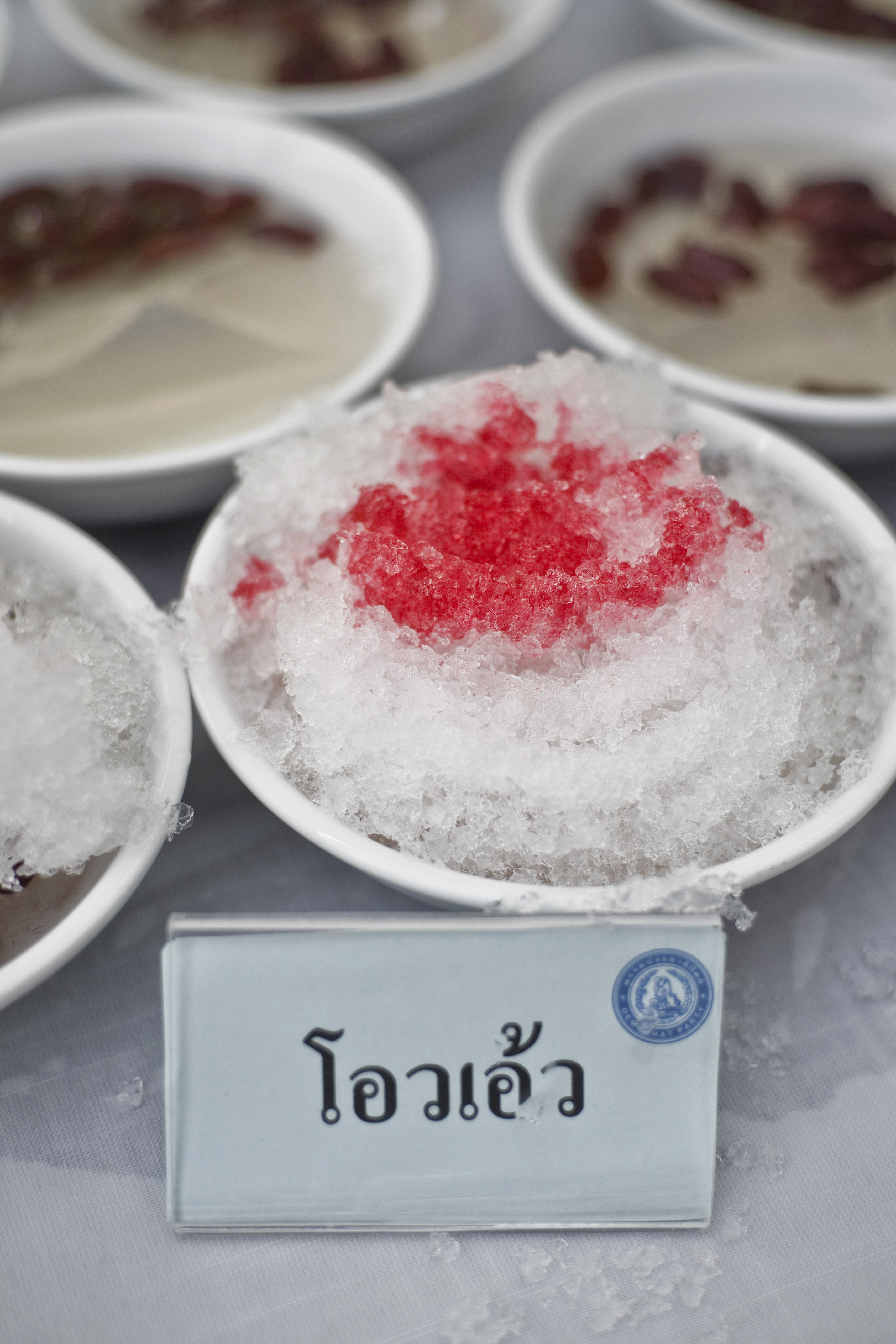 โอวเอ้ว ของหรอยหรอย เมืองภูเก็ต ช่วงพักรับประทานอาหารในงานสัมมนาพรรคประชาธิปัตย์ ณ โรงแรมเมอร์ลินบีชรีสอร์ท หาดป่าตอง จังหวัดภูเก็ต วันเสาร์ ที่ 31 กรกฏาคม พ.ศ.2553 (Photographer attached to the Prime Minister of the Kingdom of Thailand : Peerapat Wimolrungkarat / พีรพัฒน์ วิมลรังครัตน์)